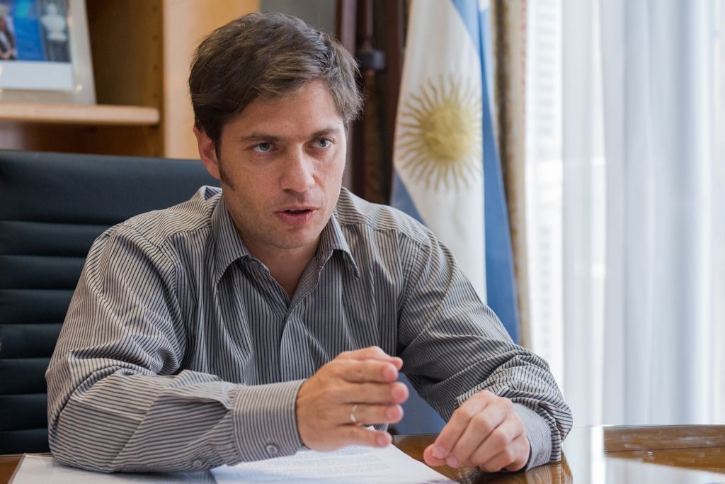 Foto de perfil